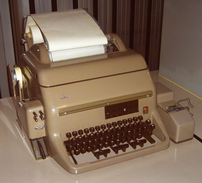 Fernschreiber, Modell T100 als Tischmodell, Hersteller Fa. Siemens Dieser mechanische Fernschreiber war modular aufgebaut, er war also erweiterbar. Links angebaut ein Streifenlocher zur Erzeugung eines Lochstreifens, darunter der transparente Auffangbehälter für die ausgestanzten "Löcher". Rechts der optionale Lochstreifenleser, mit dem vorgefertigte Nachrichten mit maximaler Geschwindigkeit gesendet werden. Am Grundgerät selbst ist über dem Betriebsstundenzähler ein roter Hinweis über eine Umrüstung auf 75 Baud zu erkennen. Nach einer bestimmten Laufzeit wurden die von der Deutschen Bundespost gemieteten Fernschreiber im FZZA Elmshorn komplett zerlegt und neu aufgebaut. Die Leertaste hat links und rechts die Umschaltung zwischen Buchstaben und Ziffern, notwendig durch den Baudot-Code mit nur fünf Bit. Papier ist eine Endlosrolle, durch die verrutschte graue Zwischenlage vermutlich ein Durchlagpapier mit einer Kopie.